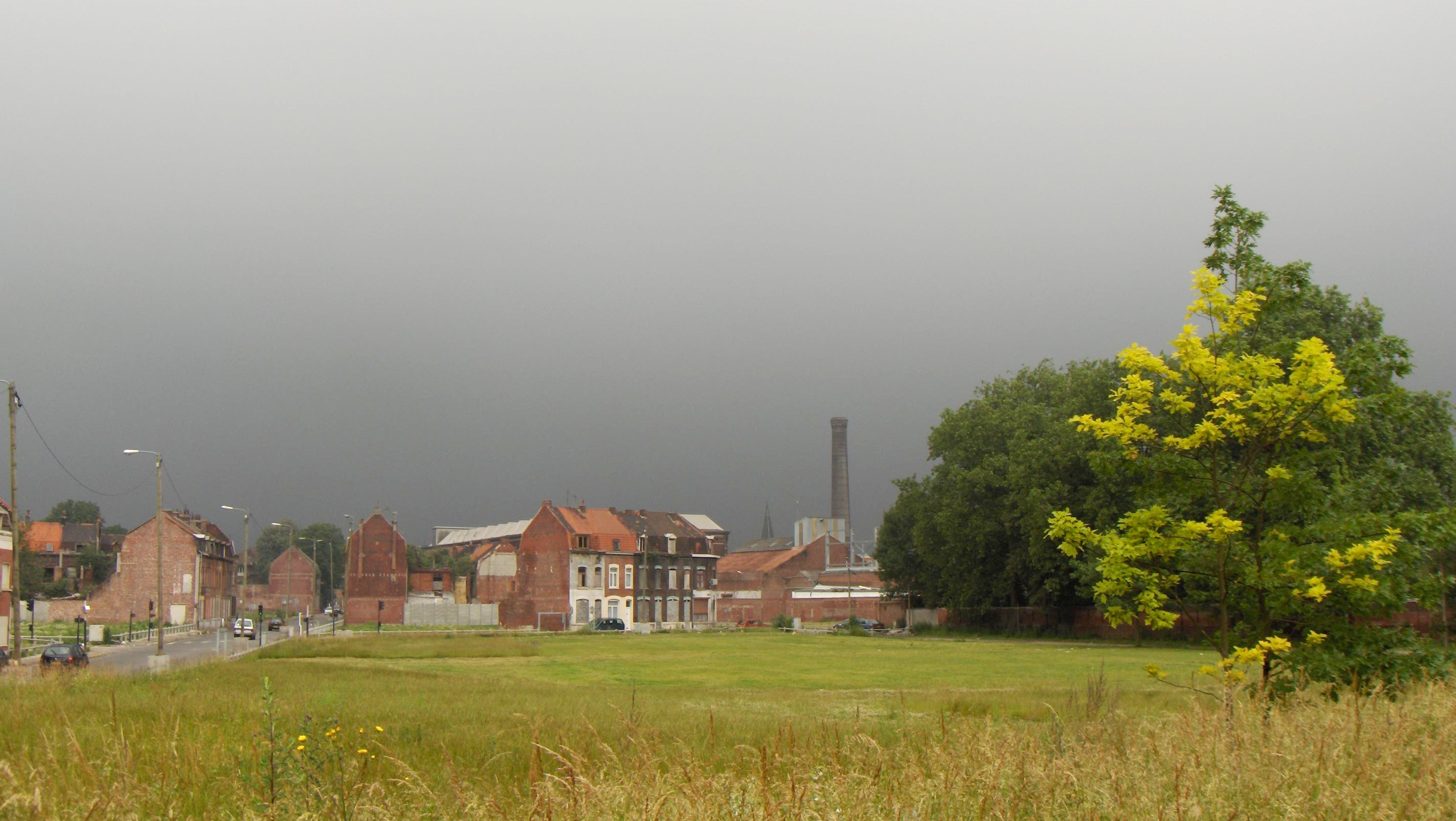 Roubaix (France, dépt. Nord), rue de Tourcoing, dans la "Zone de l'Union" au nord du centre-ville. Roubaix in Nordfrankreich, rue de Tourcoing, ehemaliges Arbeiter- und Industrieviertel, zur Zeit sog. Sanierungsgebiet "Zone de l'Union".